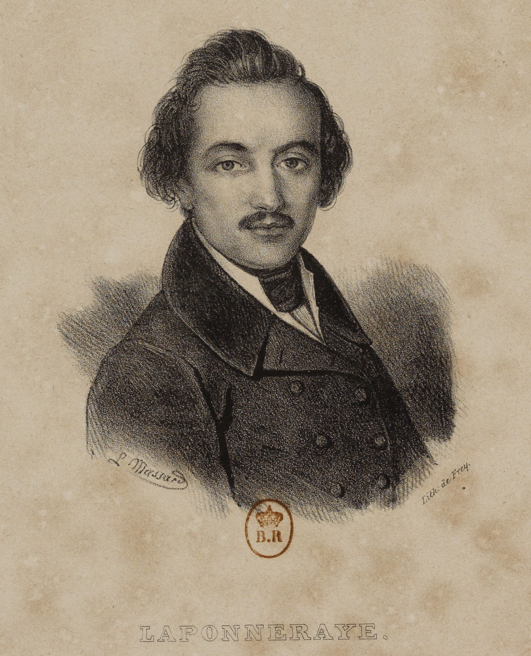 Albert Laponneraye, estampe, 1835.